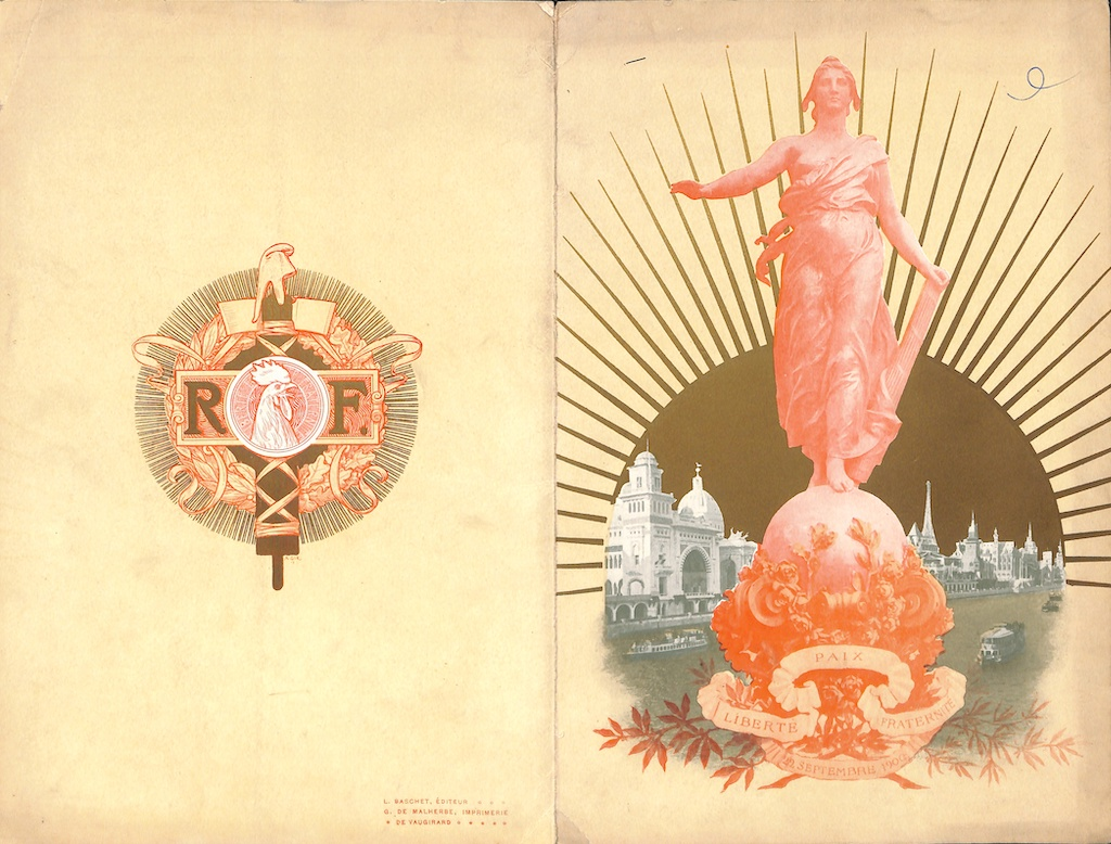 Couverture du menu du Banquet des Maires de France lors de l'Exposition Universelle le 22 septembre 1900 sous la présidence d'Émile LOUBET, Président de la République Française.